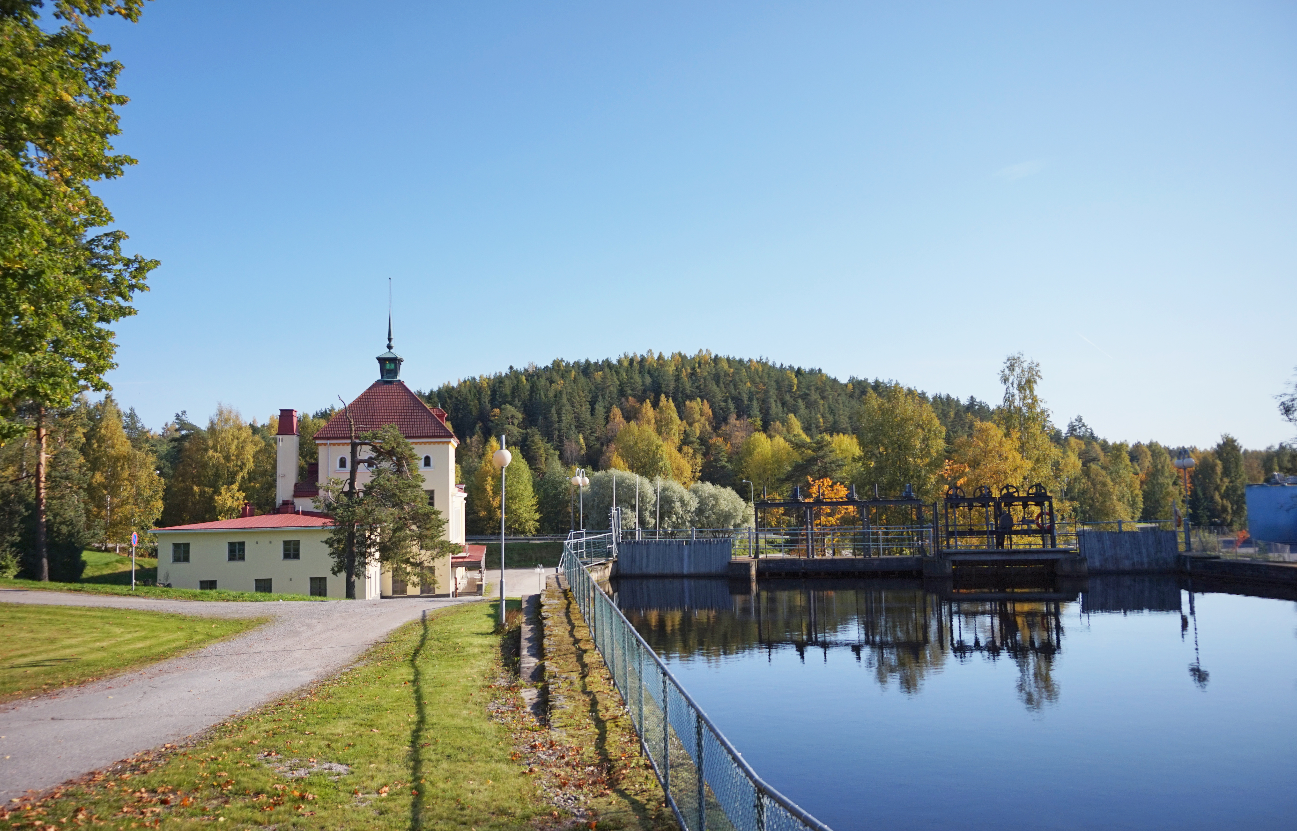 Jämsänkosken teollisuusympäristö, taka-alalla Linnasenvuori.